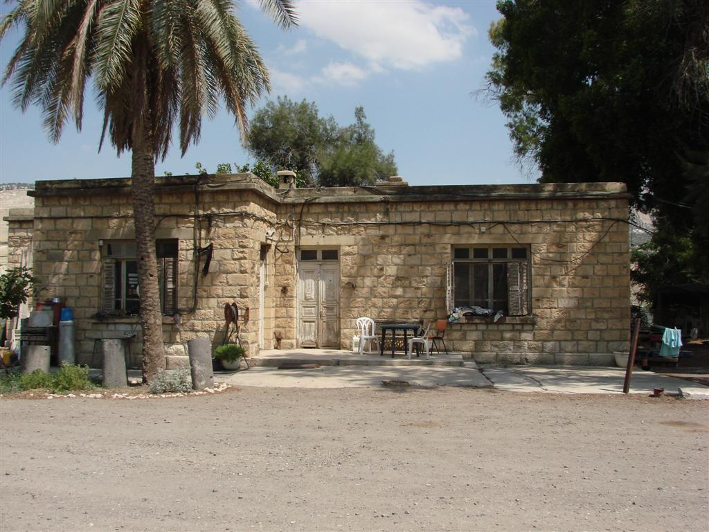 תחנת אל חמה - בניין מגורים